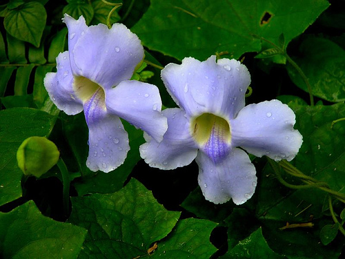 Blue trumpet vine